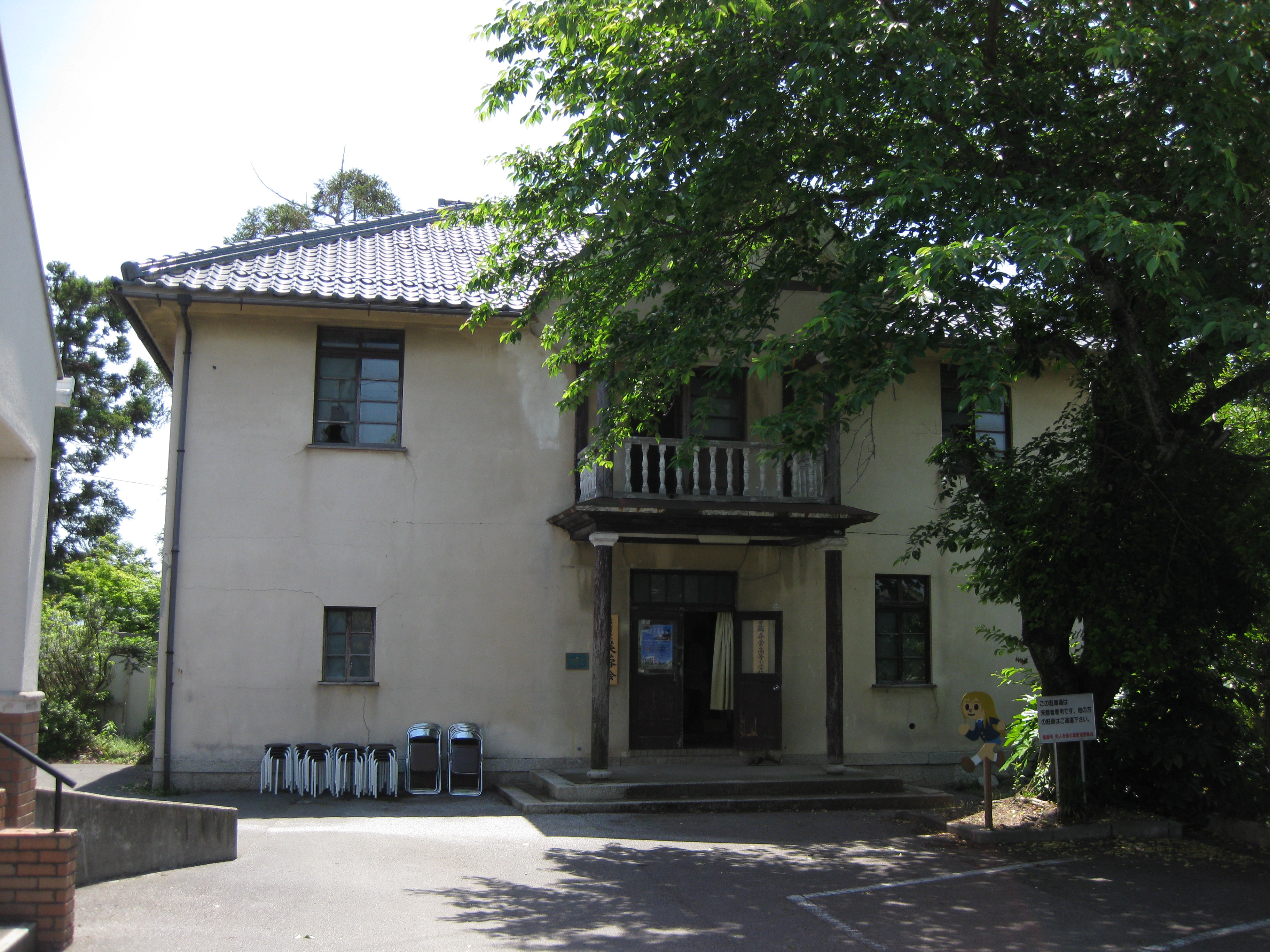 豊郷小学校初代校舎